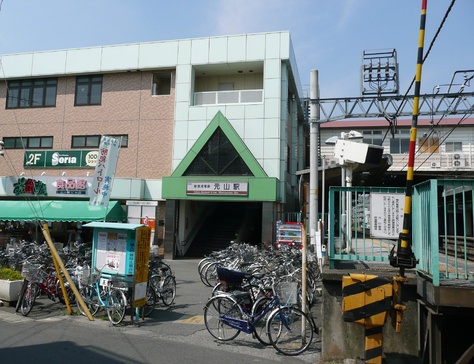 元山駅五香南1丁目側出口